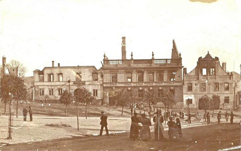 Přibyslav, hotel na náměstí po požáru dne 15. října 1908.